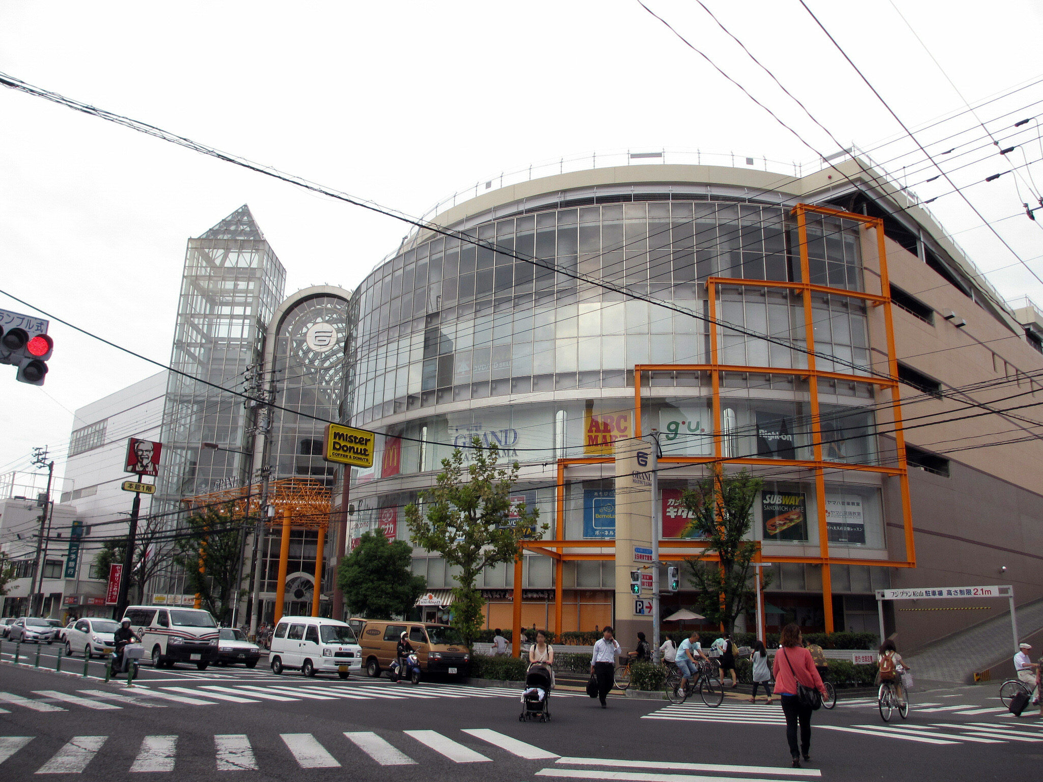 Fuji GRAND MATSUYAMA, Miyatamachi